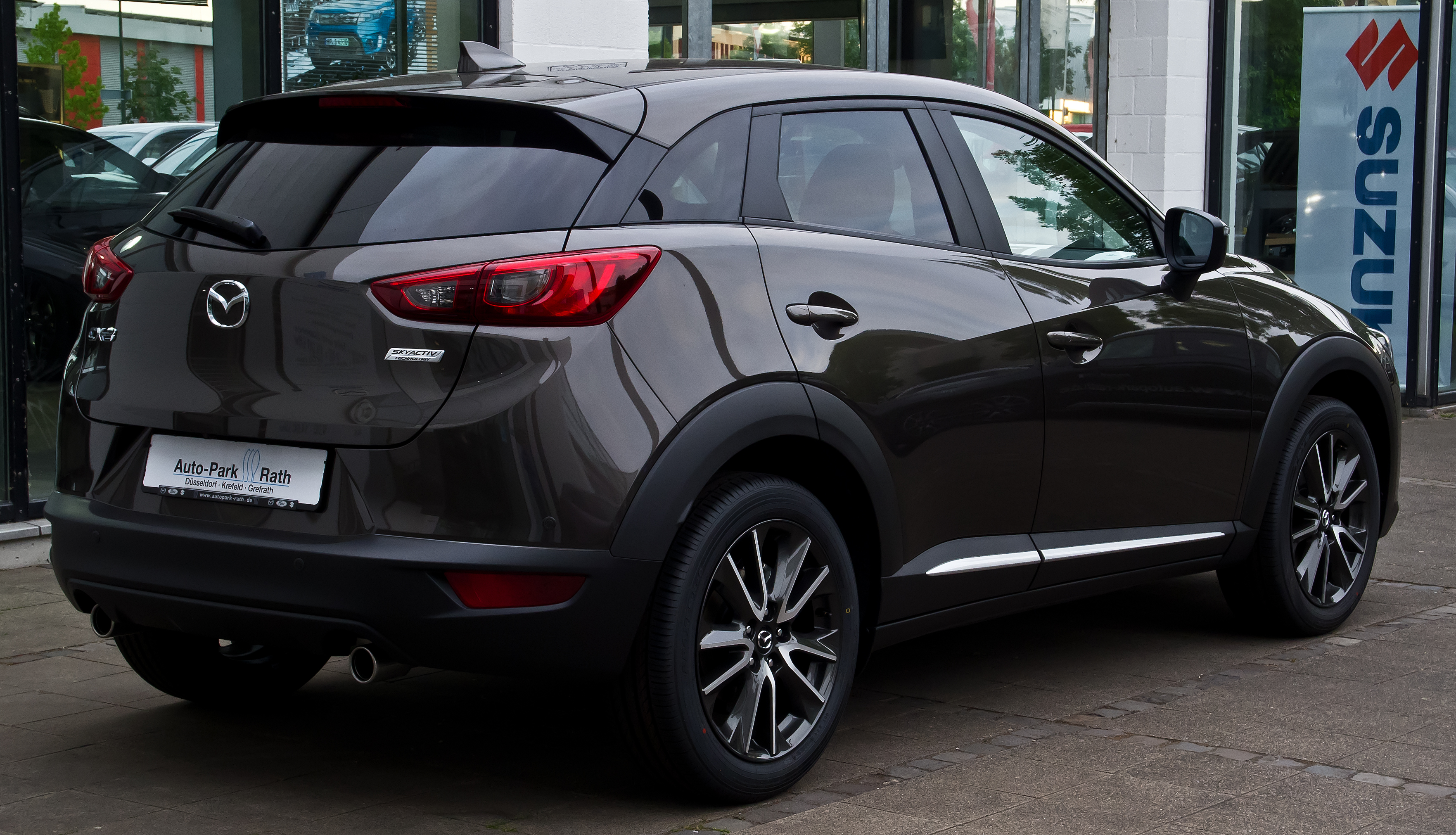 Mazda CX-3 SKYACTIV-G 120 FWD Sports-Line